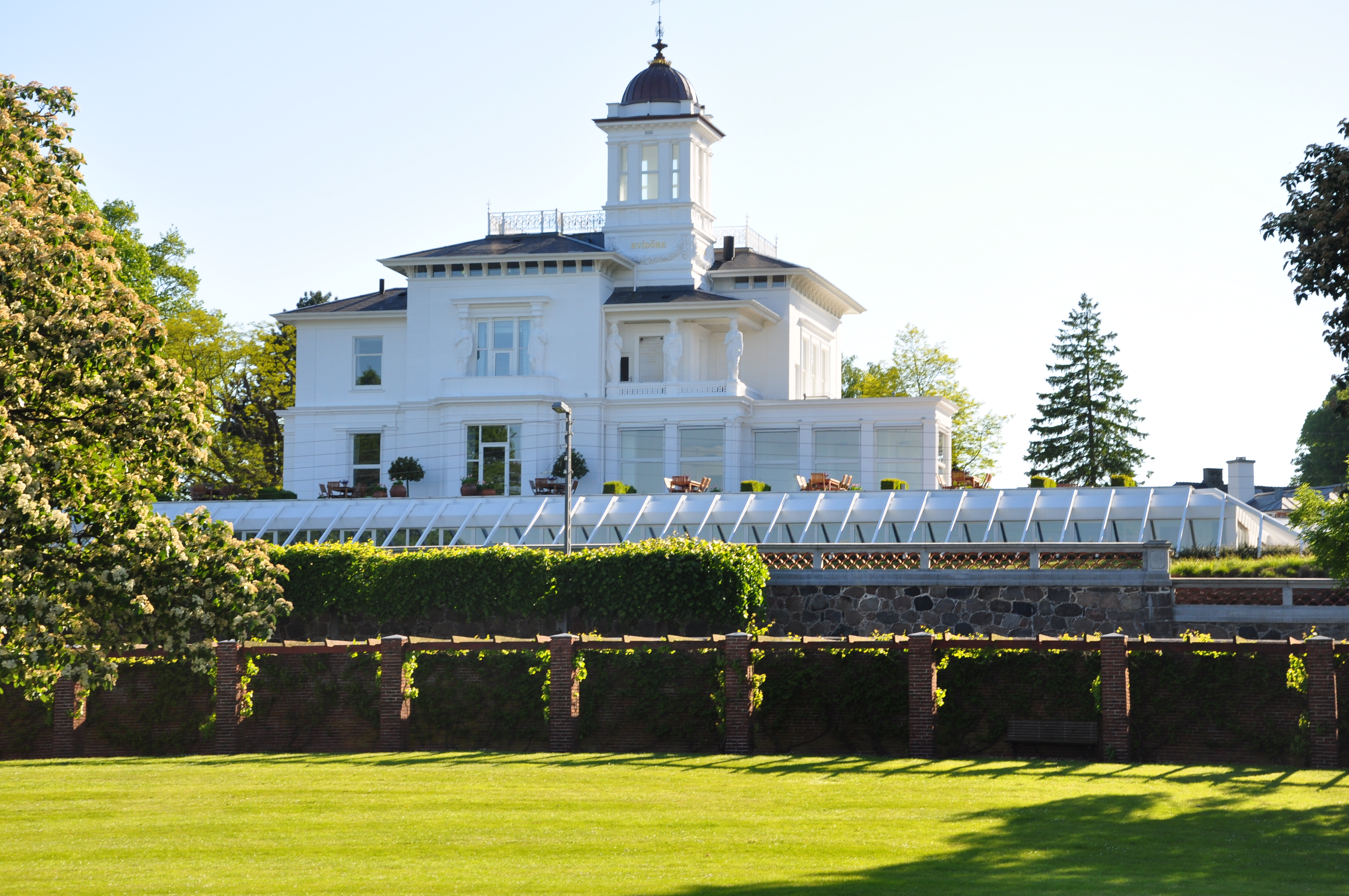 Hvidøre on Strandvejen North of Copenhagen, Denmark